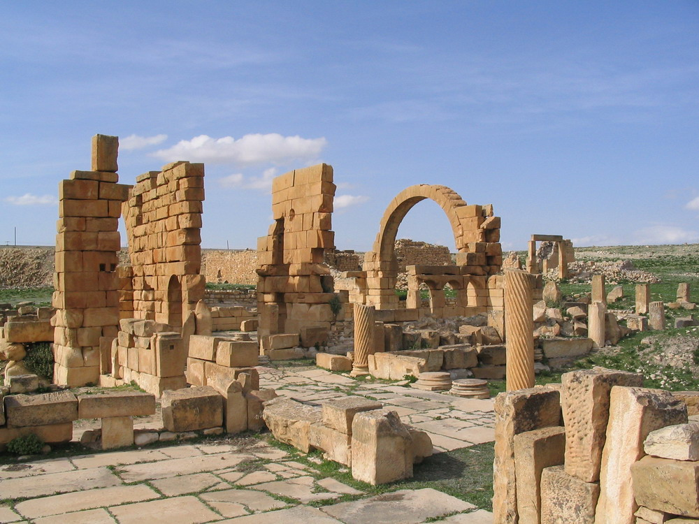 Monument à auges